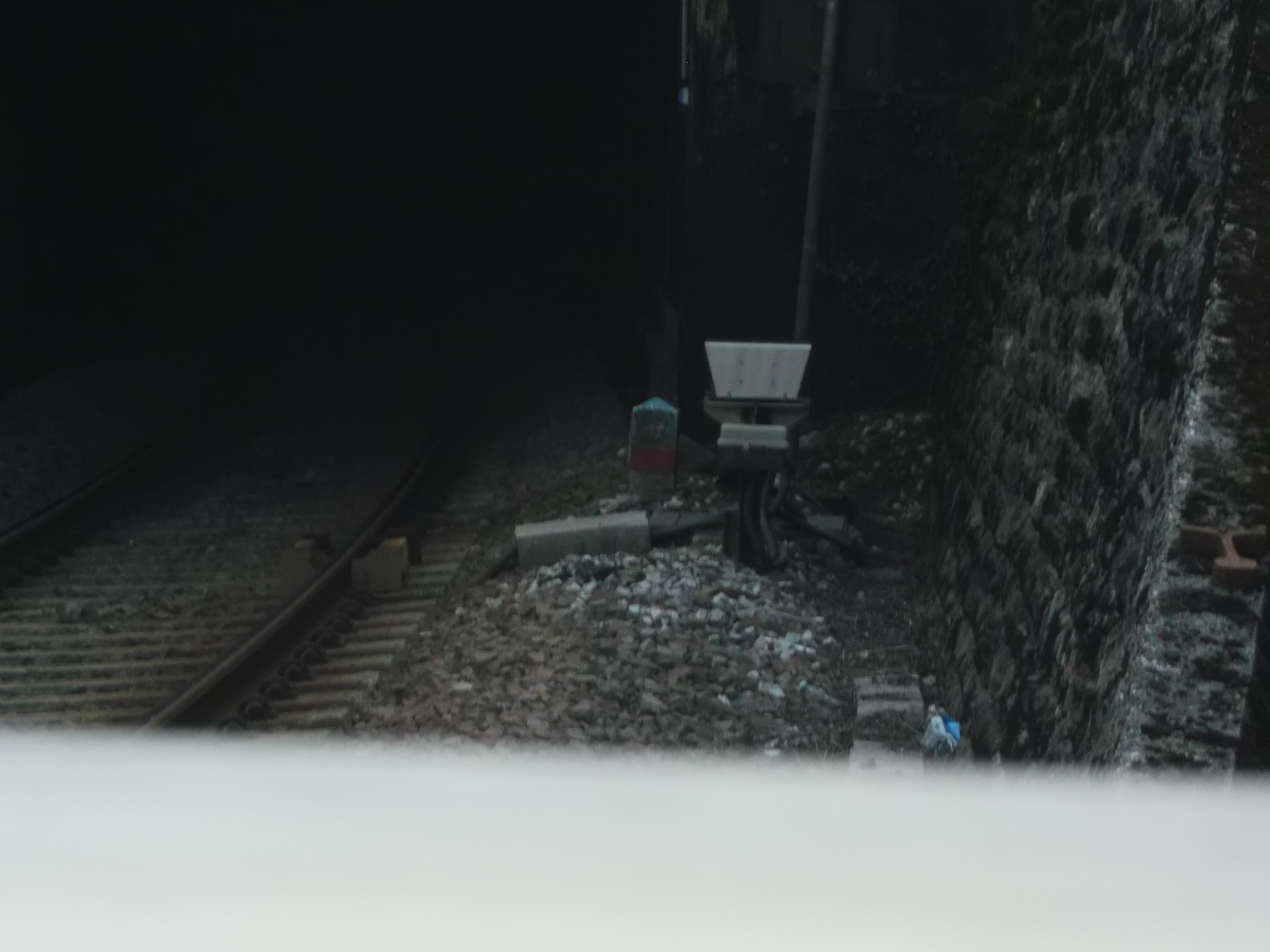 Picchetto presso l'entrata della galleria prima della Stazione di Belluno.